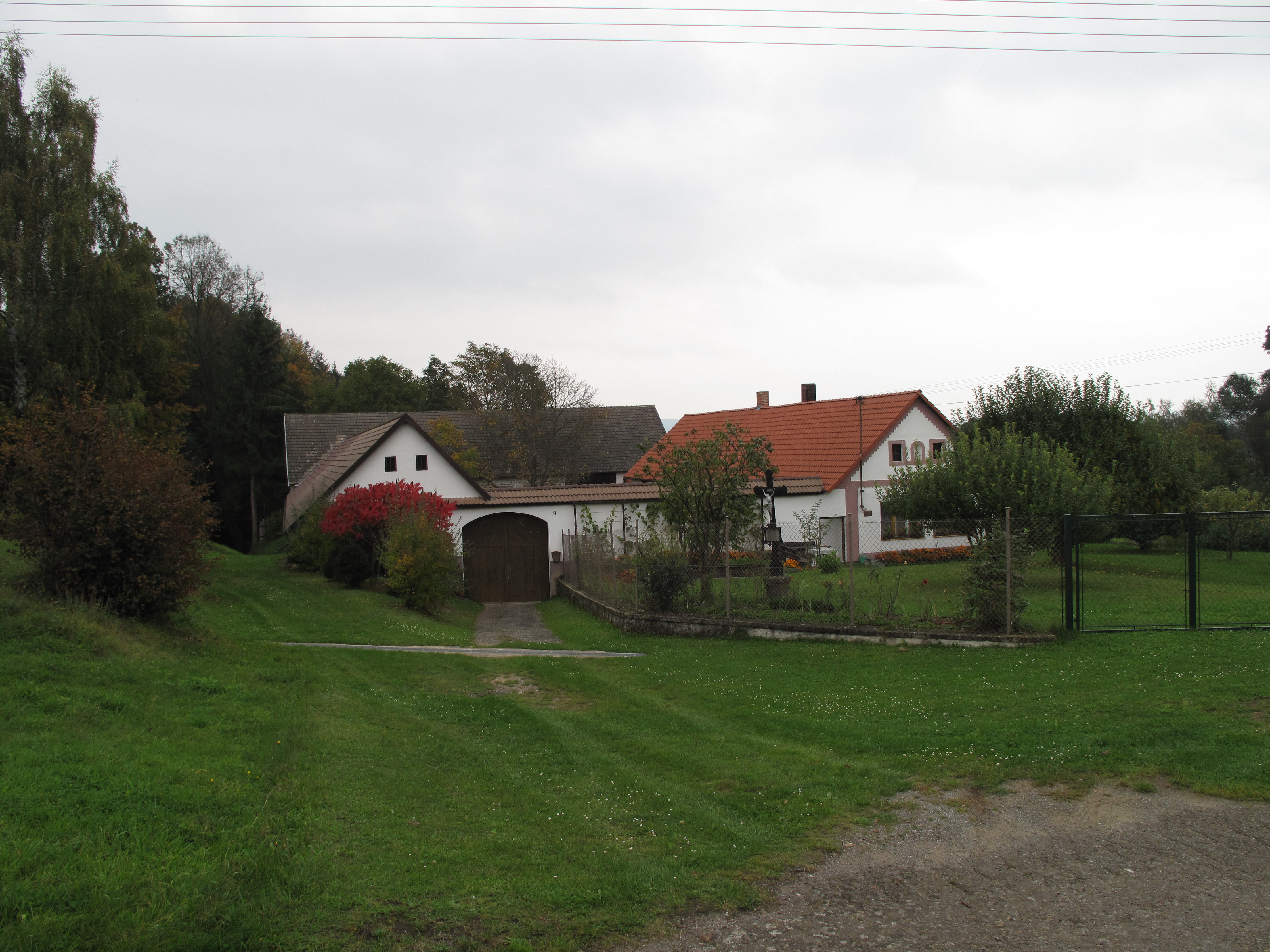 Domy se zahradou v Křekovicích. Okres Tábor, Česká republika.